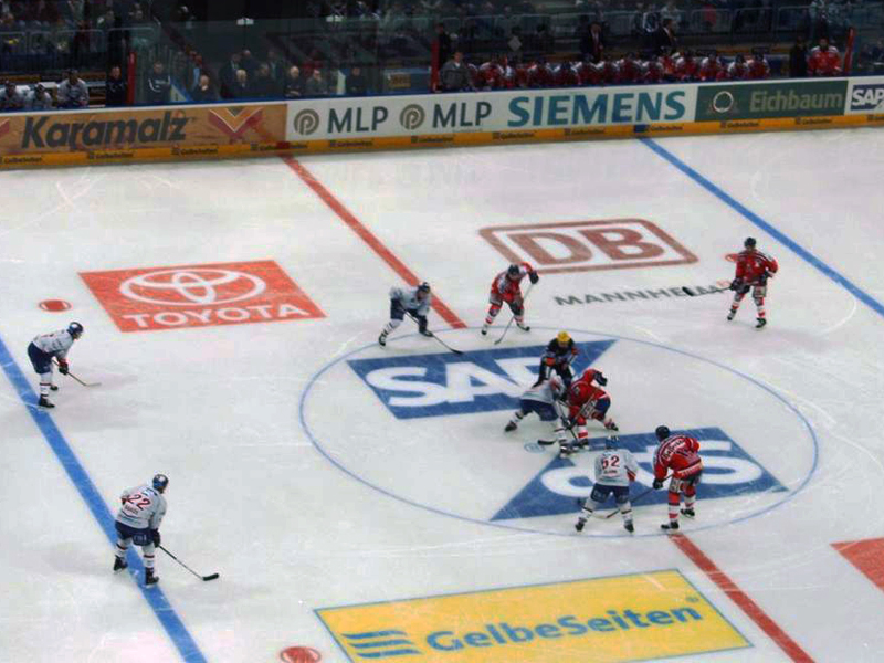 Bully beim Eishockey-Spiel Adler Mannheim : Kassel Huskies